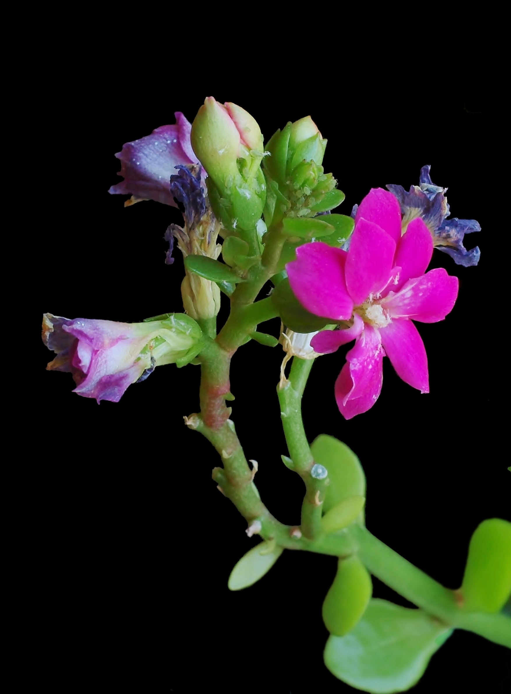 Kalanchoe arborescens